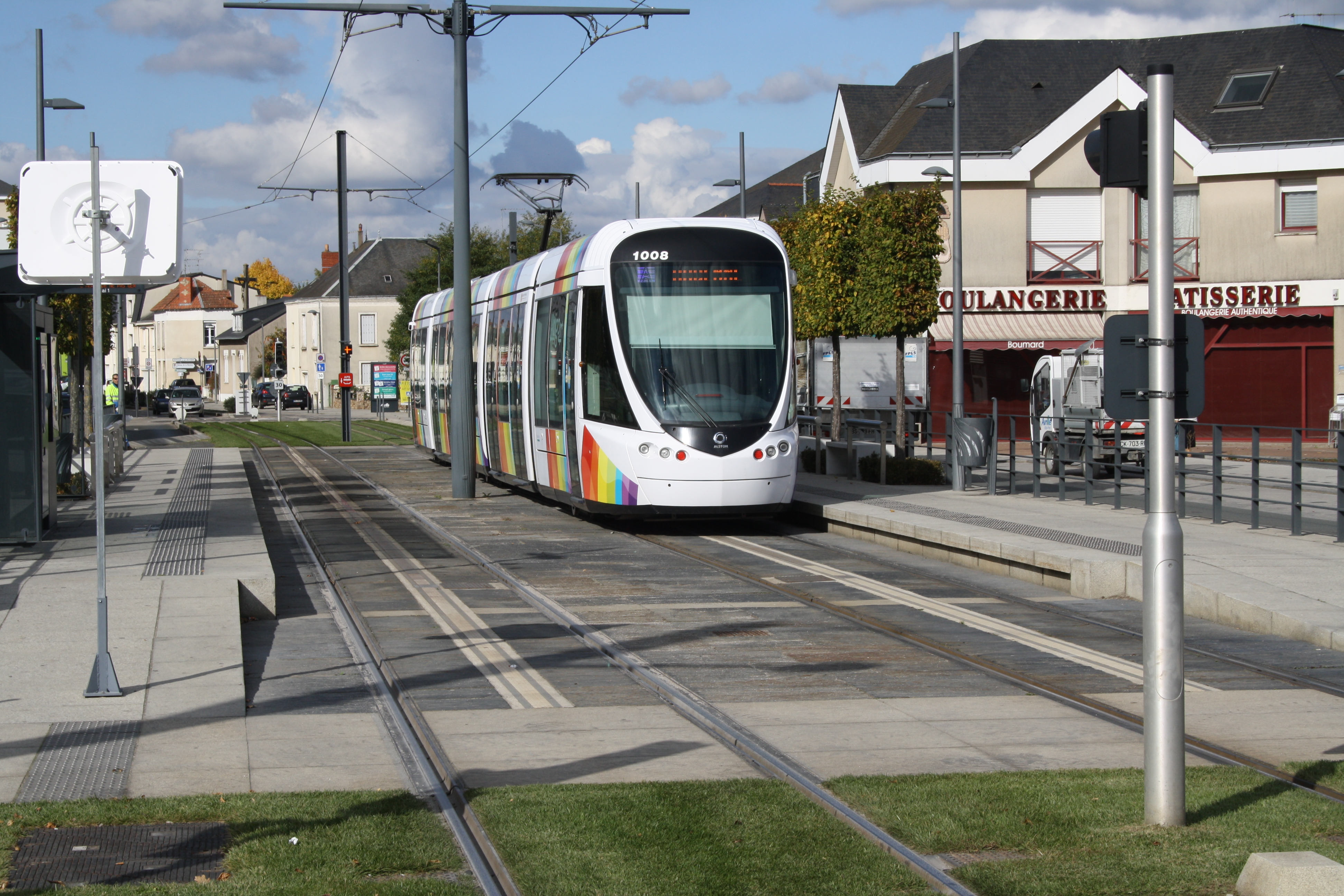 Tram Angers in Avrillé